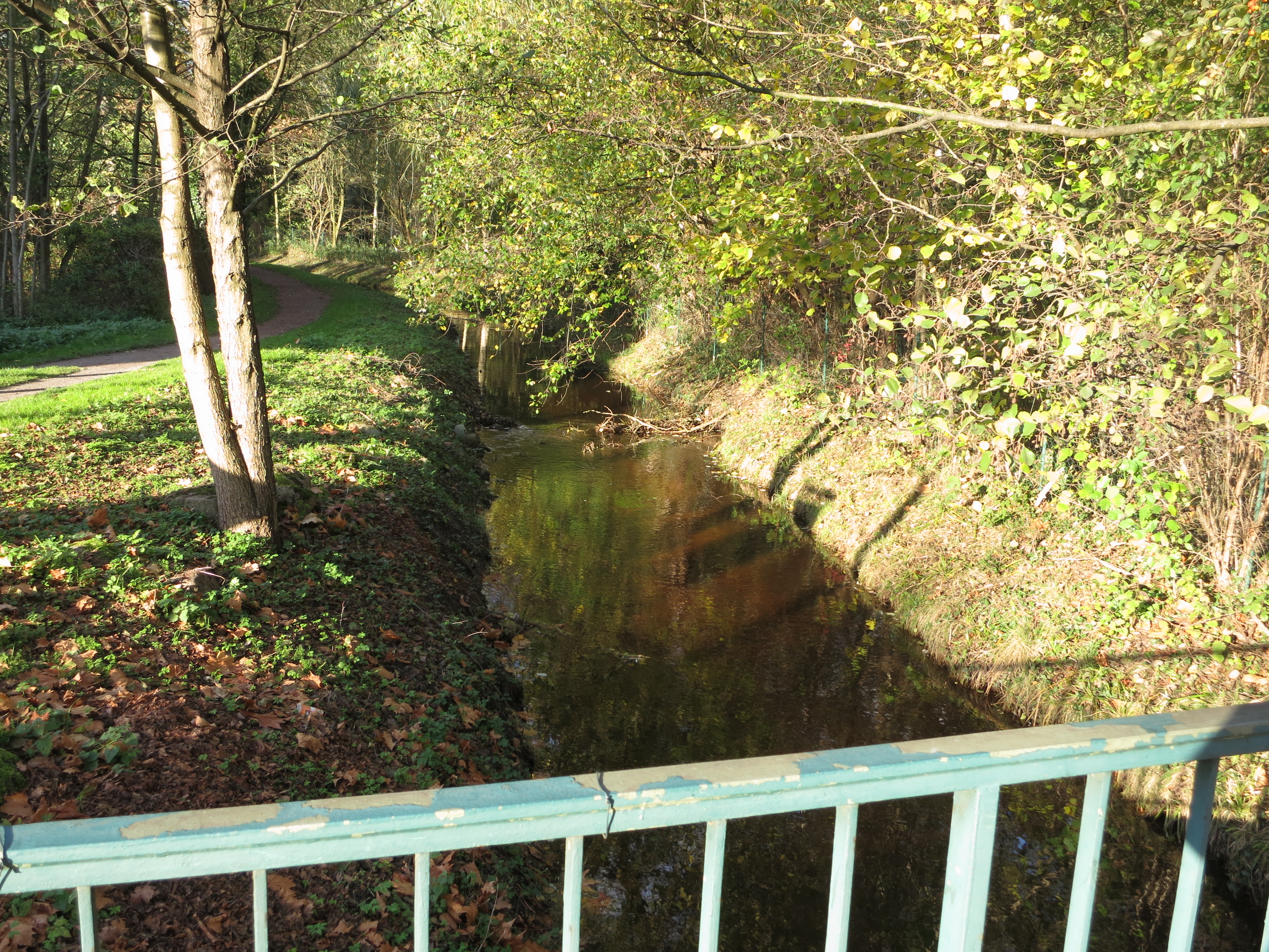 Sule in Sulingen oberhalb Lünings Mühle, nördlich der Langen Straße